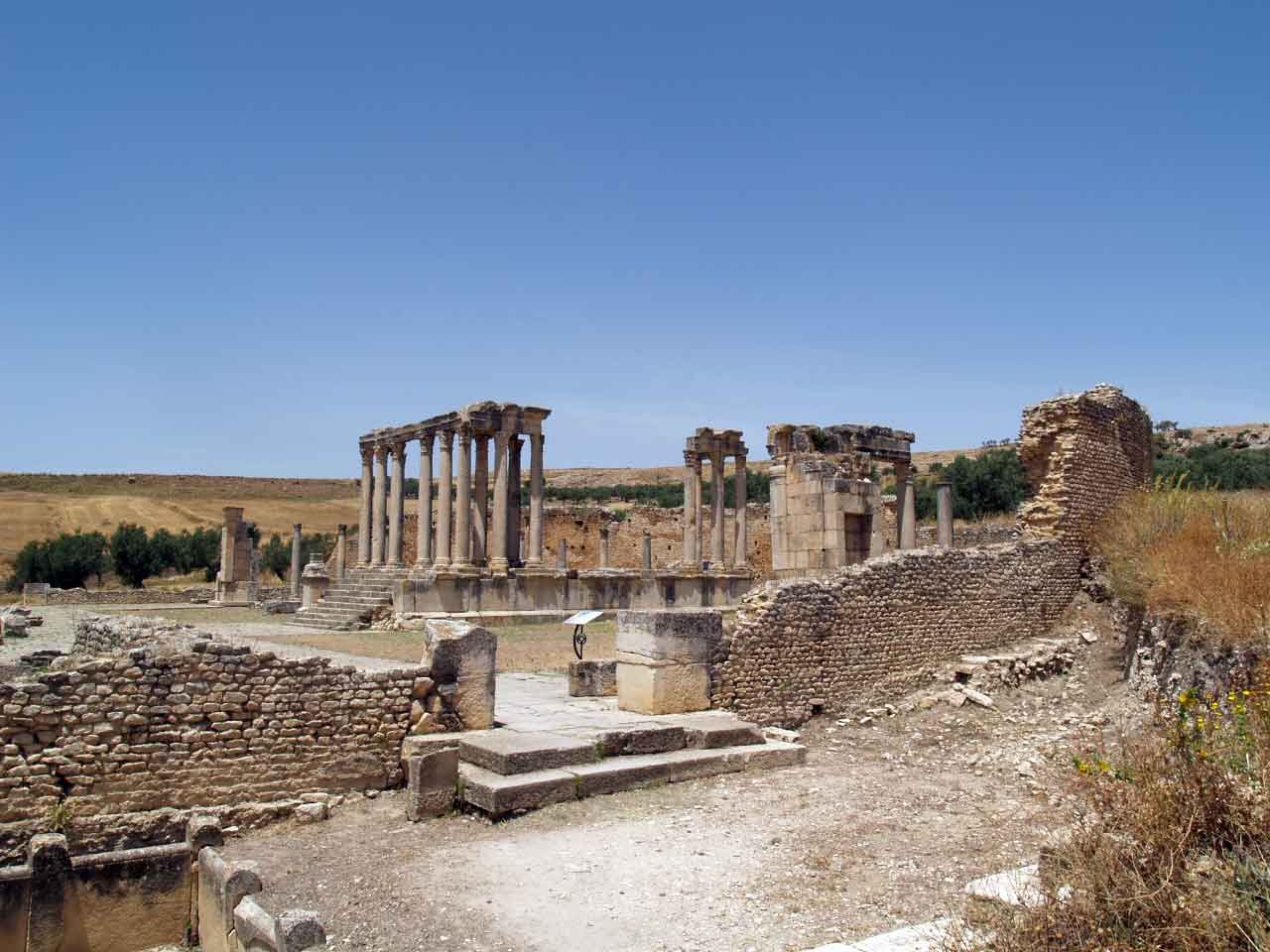 Le temple de Caelestis à Dougga. Juin 2006 Bertrand